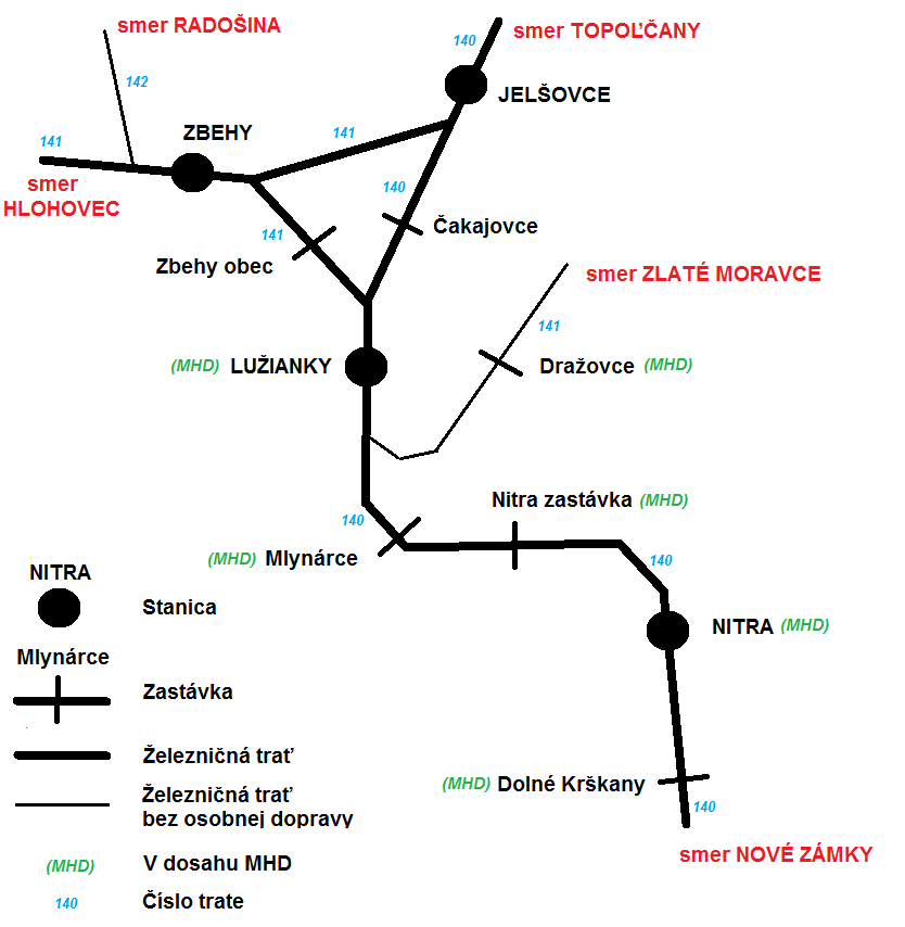 Sieť železničnej dopravy v okolí mesta Nitra